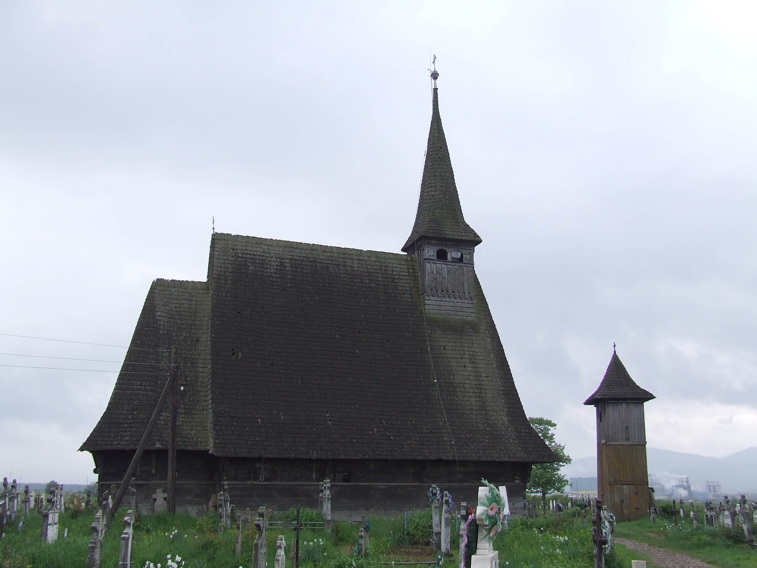 Biserica de lemn din Sebiş, judeţul Bihor